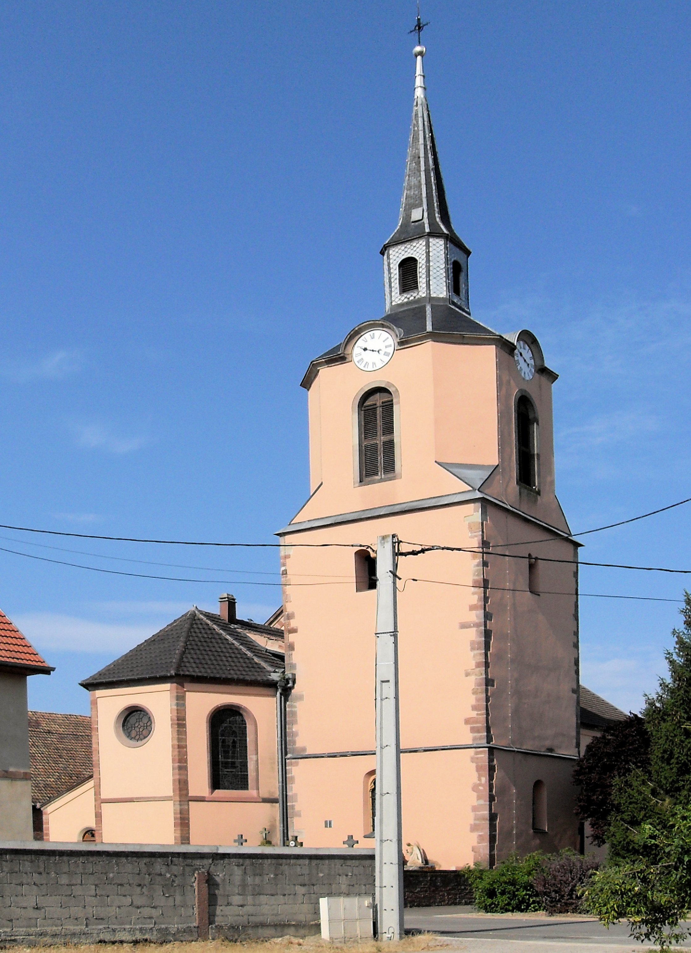 L'église Saint-Laurent de Hessenheim